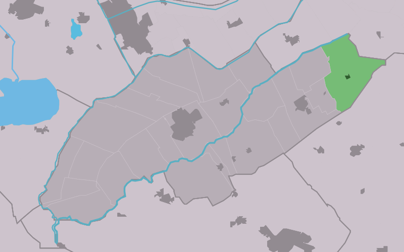 Kaartsje fan himrik fan Boyl